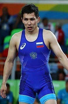 Виктор Лебедев на Олимпиаде в Рио после схватки с иранцем Рахими